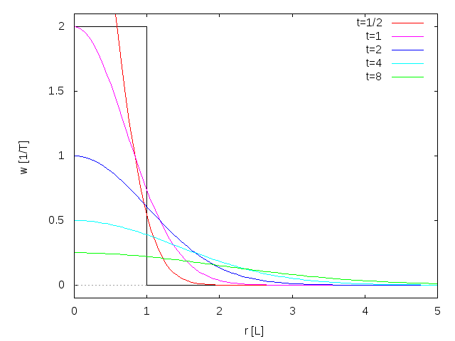 Wibelstärkenverlauf im Oseenschen Wirbel